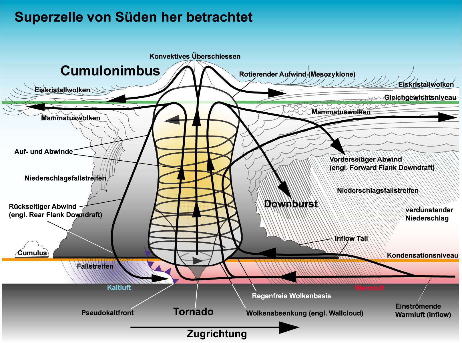 Schematische Darstellung einer Superzelle von Süden her betrachtet